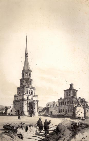 Руины ханского дворца и башня Сююмбике. Литография из альбома Андре Дюрана.